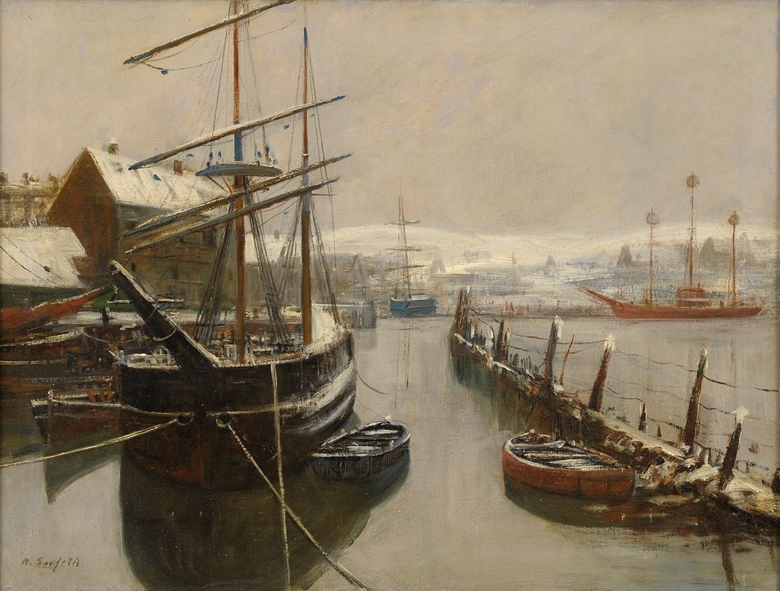 Winterliche Hafenansicht. Signiert. Öl/Lwd., 60 x 80 cm.